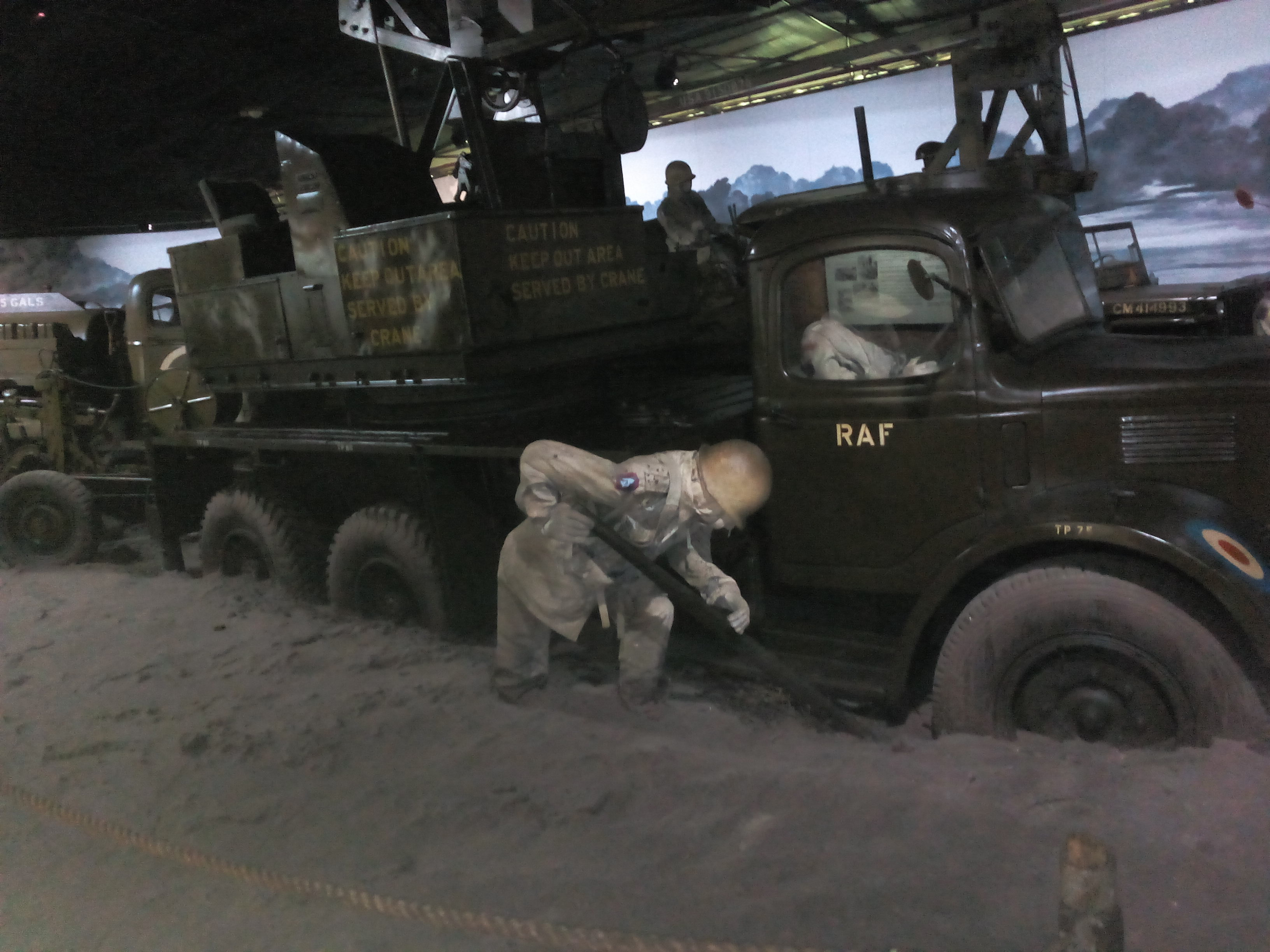 5 giugno 2018 Museo di Piana delle Orme. Padiglione: Battaglia di Cassino